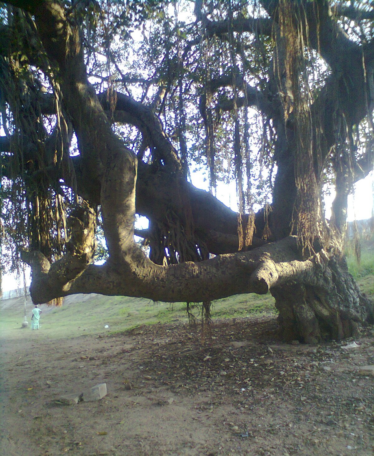 ஆலமரம், சென்னை, கோட்டை அருகில், சிறுவர் ஏறி விளையாடும் மரம். own shot